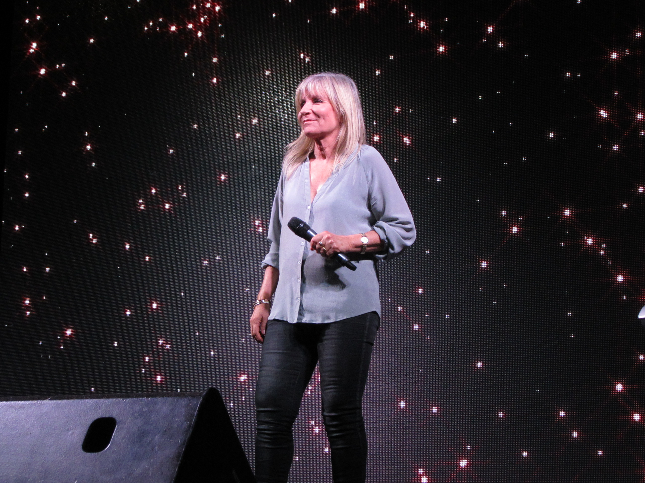 בלה דואגת, המרכז הגאה ועיריית תל אביב-יפו שמחים להזמין אתכם/ן לארוע הנוצץ של פסטיבל ארועי הגאווה - וויגסטוק 2016! השנה התקבצו מעל 20 מלכות ומלכי דראג מהמיטב שבמיטב בארץ לעוד שנה של וויגסטוק שמגיע אלינו בסימן אירוויזיון. ארכיון הארוויזיון נפתח ומיטב השירים שבוצעו באירוויזיון משנת 77 עד 2016 עם אינטרפטציות מיוחדות ומחוות מיוחדות לשירים, לזמרים והזמרות שהופיעו - יחזרו לחיים! כל המופע יהיה שילוב של פאן וגלאם שלא היה והעלאת מודעות ל-HIV/ איידס. יופיעו על הבמה הסטארים שלנו: ✩✩✩✩✩✩✩✩✩✩✩✩✩ מורן מזור, אילנית ויזהר כהן. ✩✩✩✩✩✩✩✩✩✩✩✩✩ על ההנחיה הפקדנו את: ✩✩✩✩✩✩✩✩✩✩✩✩✩ פנינה רוזנבלום, ציונה פטריוט וקיי לונג. ✩✩✩✩✩✩✩✩✩✩✩✩✩ במהלך האירוע יהיה ניתן להיבדק בחינם ובאופן אנונימי ל-HIV ועגבת בניידת הבדיקות שלנו. המלכות והמלכים שלנו: מיס לילה קרי, קיארה דופלה, גלינה פור דה ברה, רמה רימינג, ג'ניפר וואקר, ציונה פטריוט, דייזי ביץ, קלאריסה סנו-וואיט, פרינס דידי, תומא ודון חואן, אנג'לינה הרי פוט, אמילי רוז, אסיה פדרליין, ברברה בלו, סלין לה דיווין, ג'סיקה היסטריקה, ליזי לה בל, סילה מקיאטו קמילה קורטז. כל המופע ילוו ע"י שי סוזאנה והרכב POP-ART. הפקה בידי: דניאל מריומה, לינור בר גיל ועודד סולומון